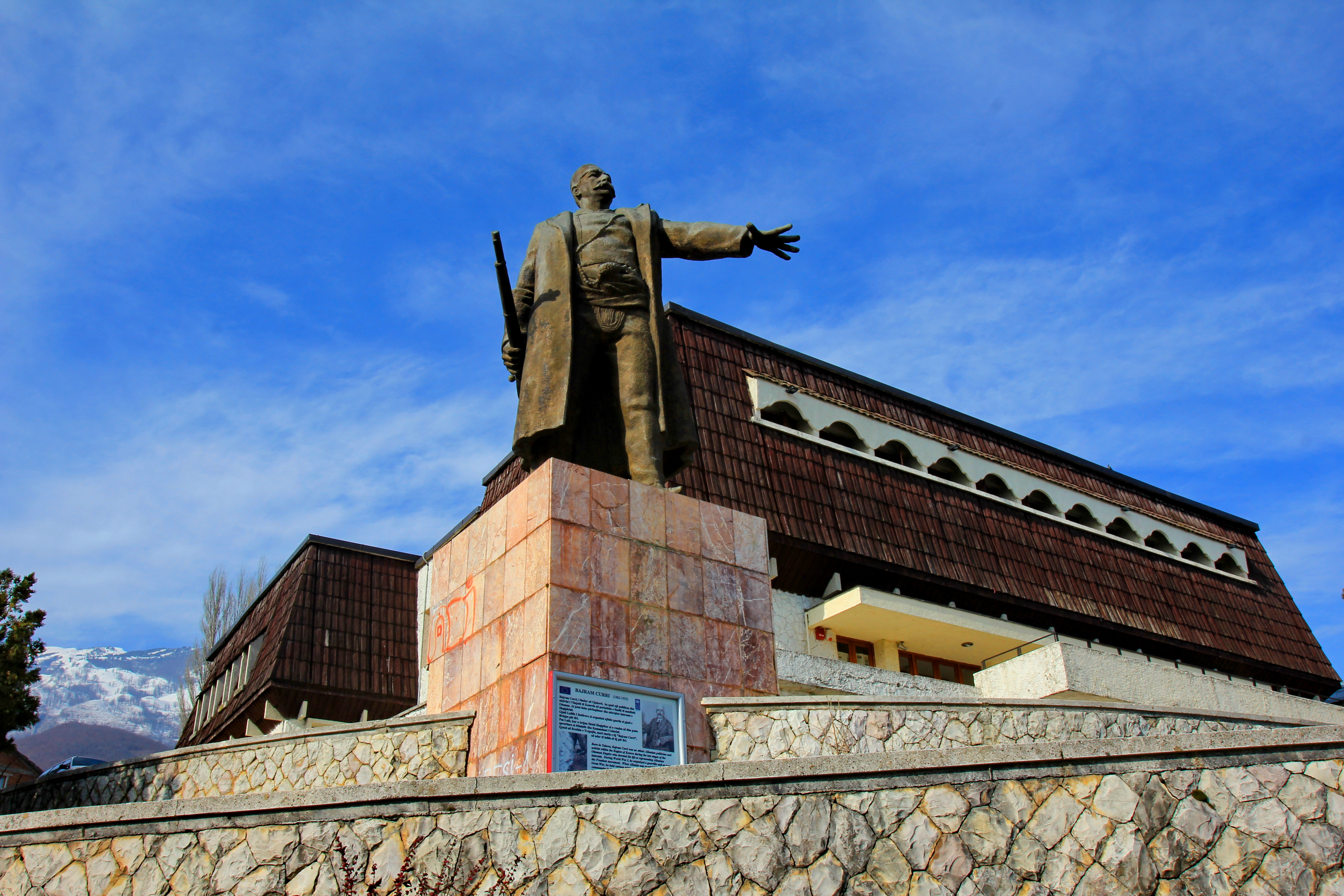 Bajram Curri Panoramë